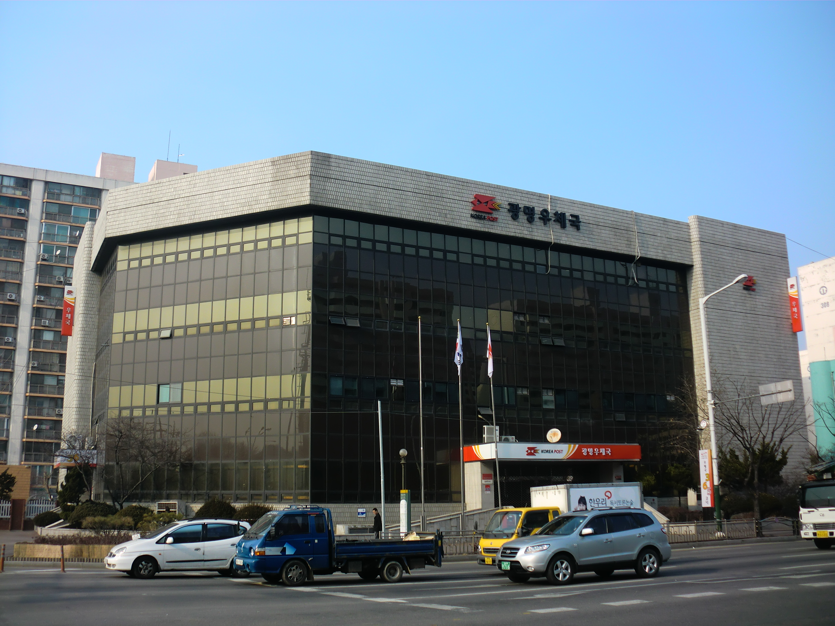 경기도 광명시에 있는 광명우체국